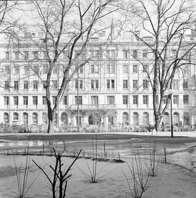 Bonnierhuset, Sveavägen 54, 56, 58, från Adolf Fredriks kyrkogård Fastigheten MORASET 22. Sveavägen 54. Sveavägen 56. Sveavägen 58. Norrmalm